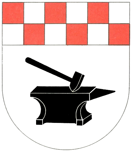 Wappen von Schmißberg